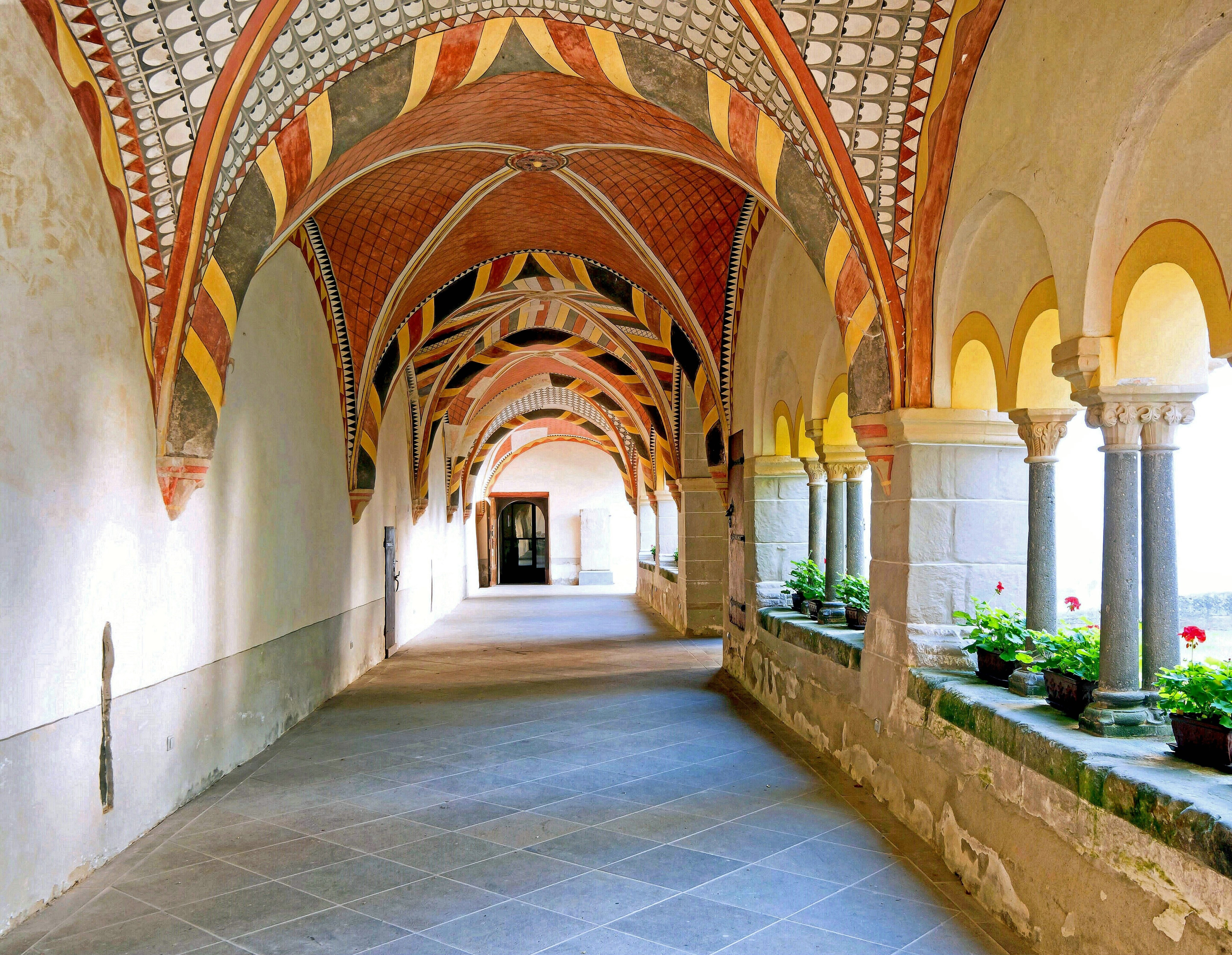 Die Bemalung des Kreuzgangs wurde 1998 nach Resten der ältesten Farbschicht aus dem 13. Jahrrhundert wiederhergestellt. Sie vermittelt einen guten Eindruck der Farbigkeit mittelalterlicher Klausuranlagen.